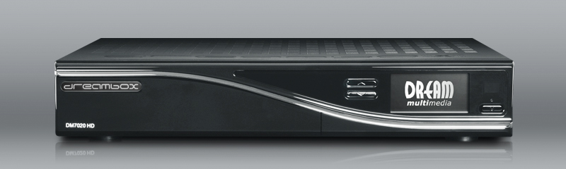 ресивер